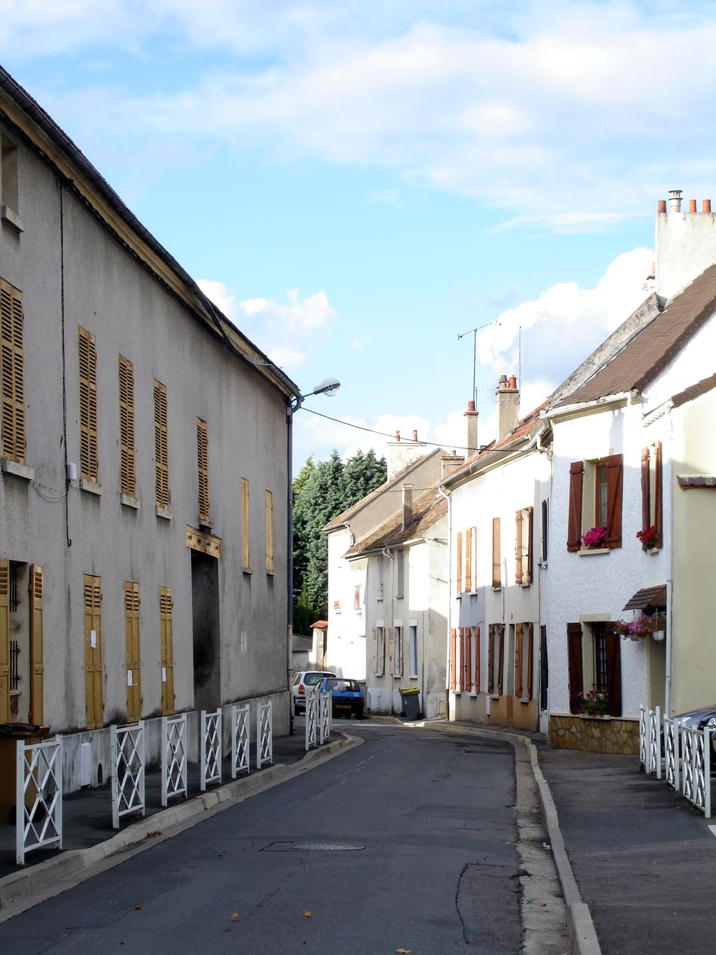 La rue Grangeret de la Grange au Plessis-Bouchard (Val-d'Oise), France